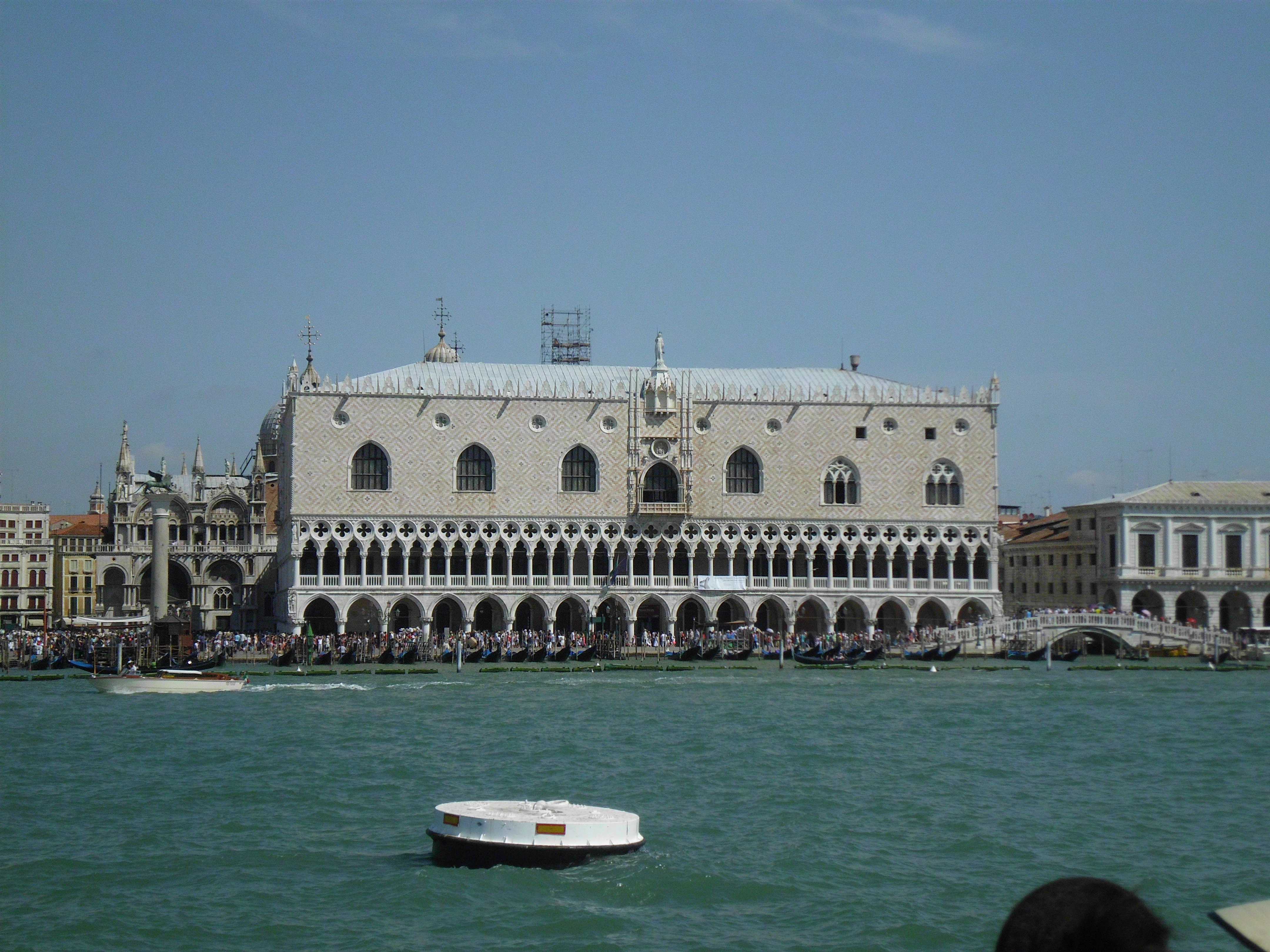 Venedig, Italien: Vorderansicht des Dogenpalastes